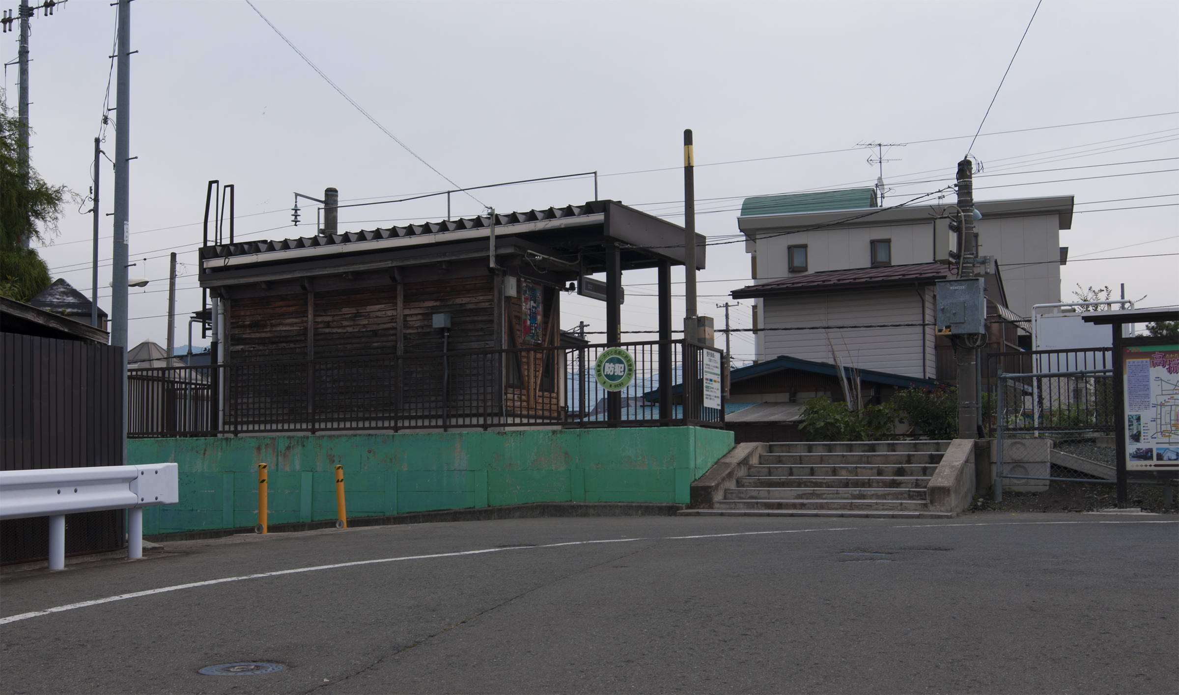 東日本旅客鉄道株式会社奥羽本線（JR山形線）高擶駅駅出入口